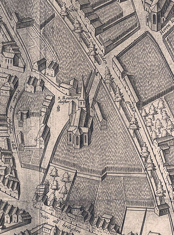 Ausschnitt des Mercator - Stadtplanes, Bereich Köln Altstadt Nord, St. Revilien